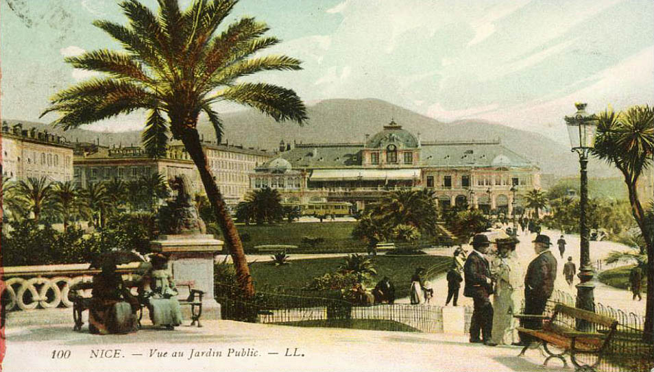 Le jardin public dans les années 1900.